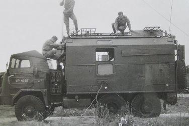 Radiostacja jednowstęgowa KF R-140 na samochodzie Star-660. Na dachu widoczna złożona antena promieniowania pionowego. Zdjęcie pochodzi ze strony